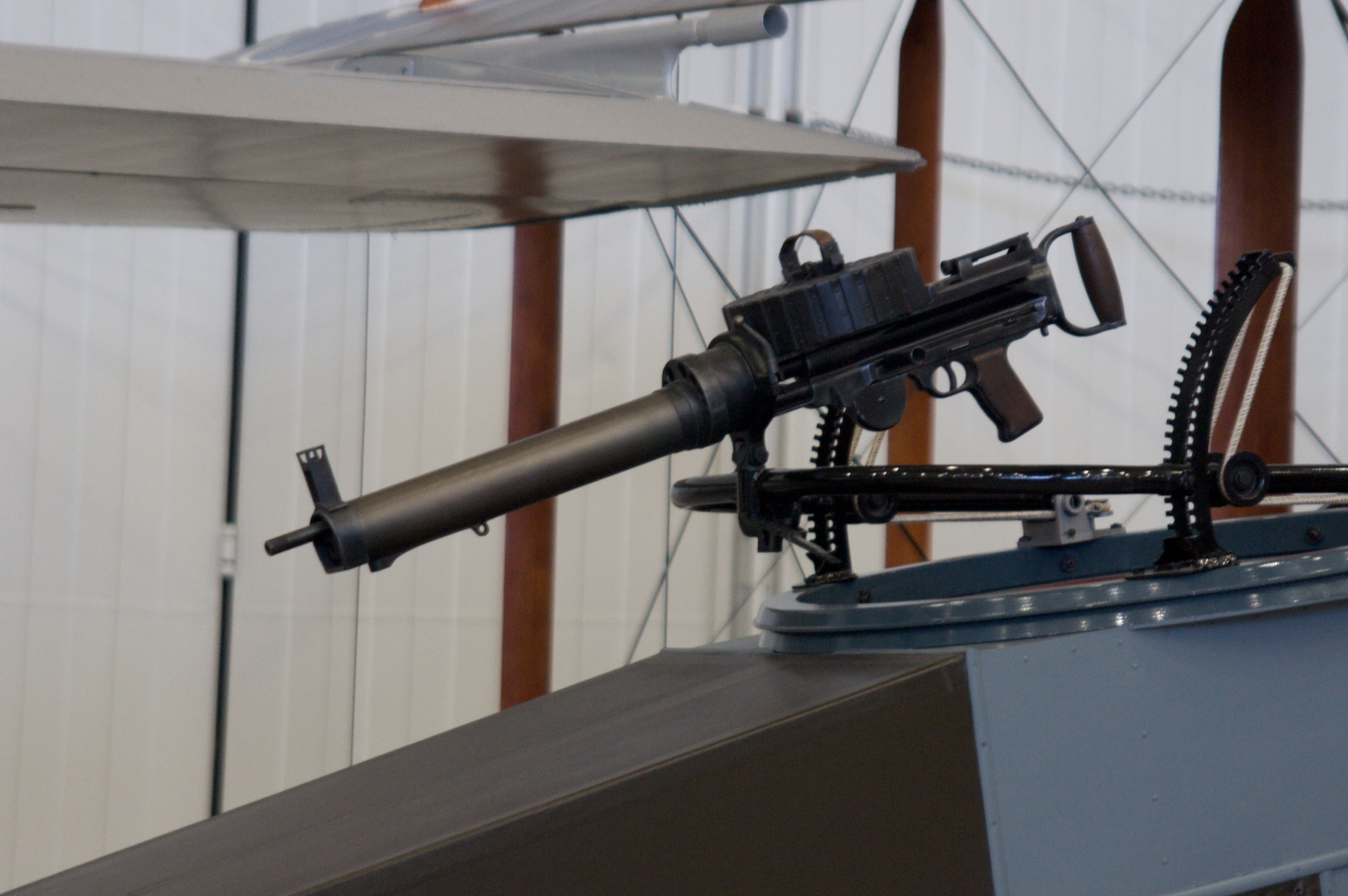 Gun